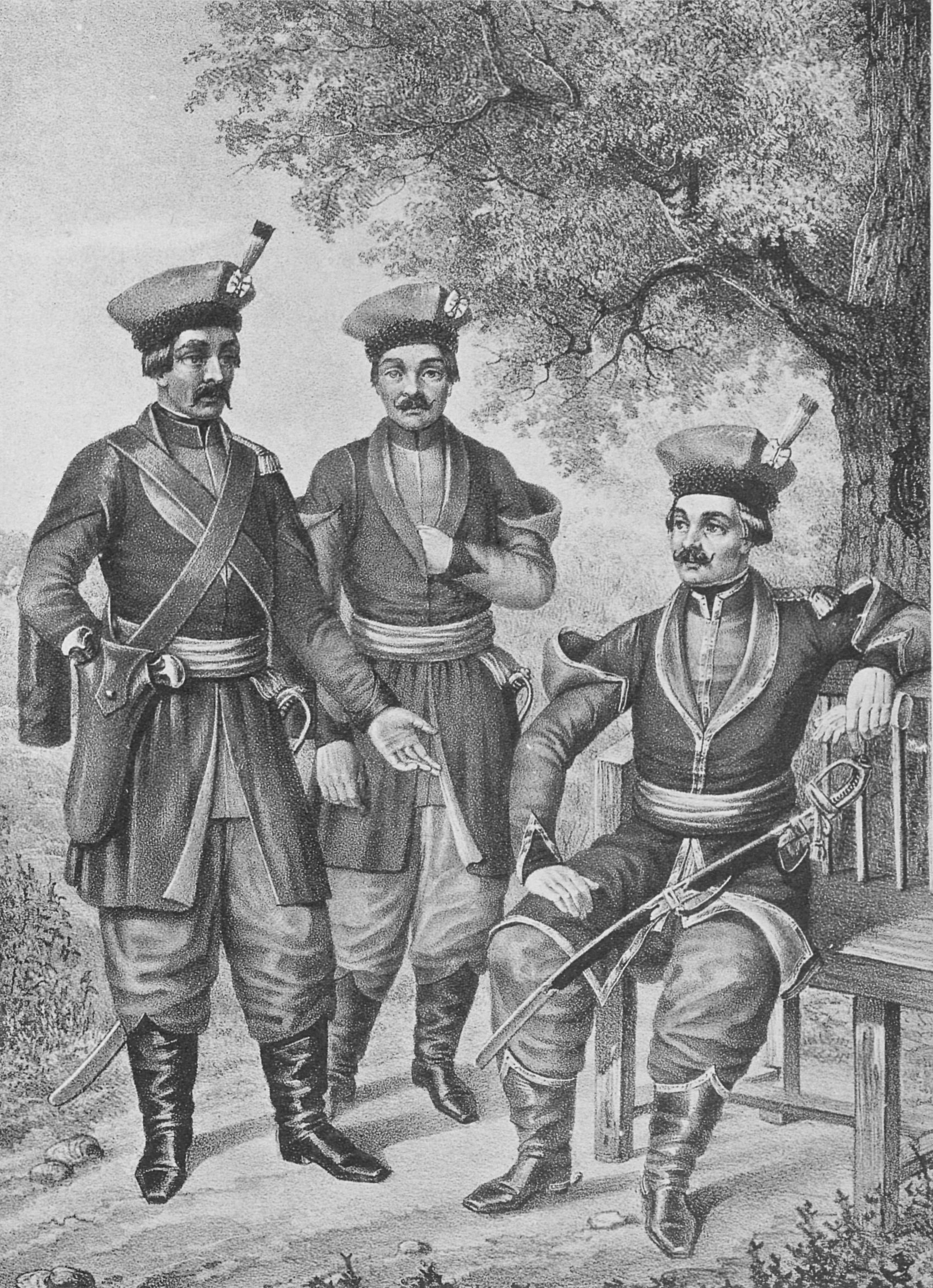 Рядовой, Нестроевой и Офицер Казачей Команды Московскаго Легиона, с 1769 по 1775 г.